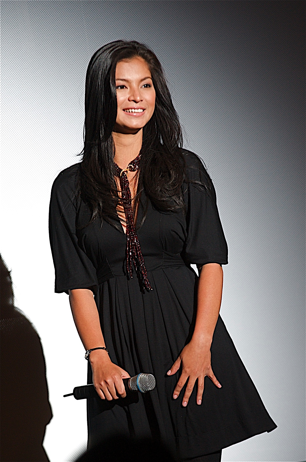 Angel Locsin, Filipino actress